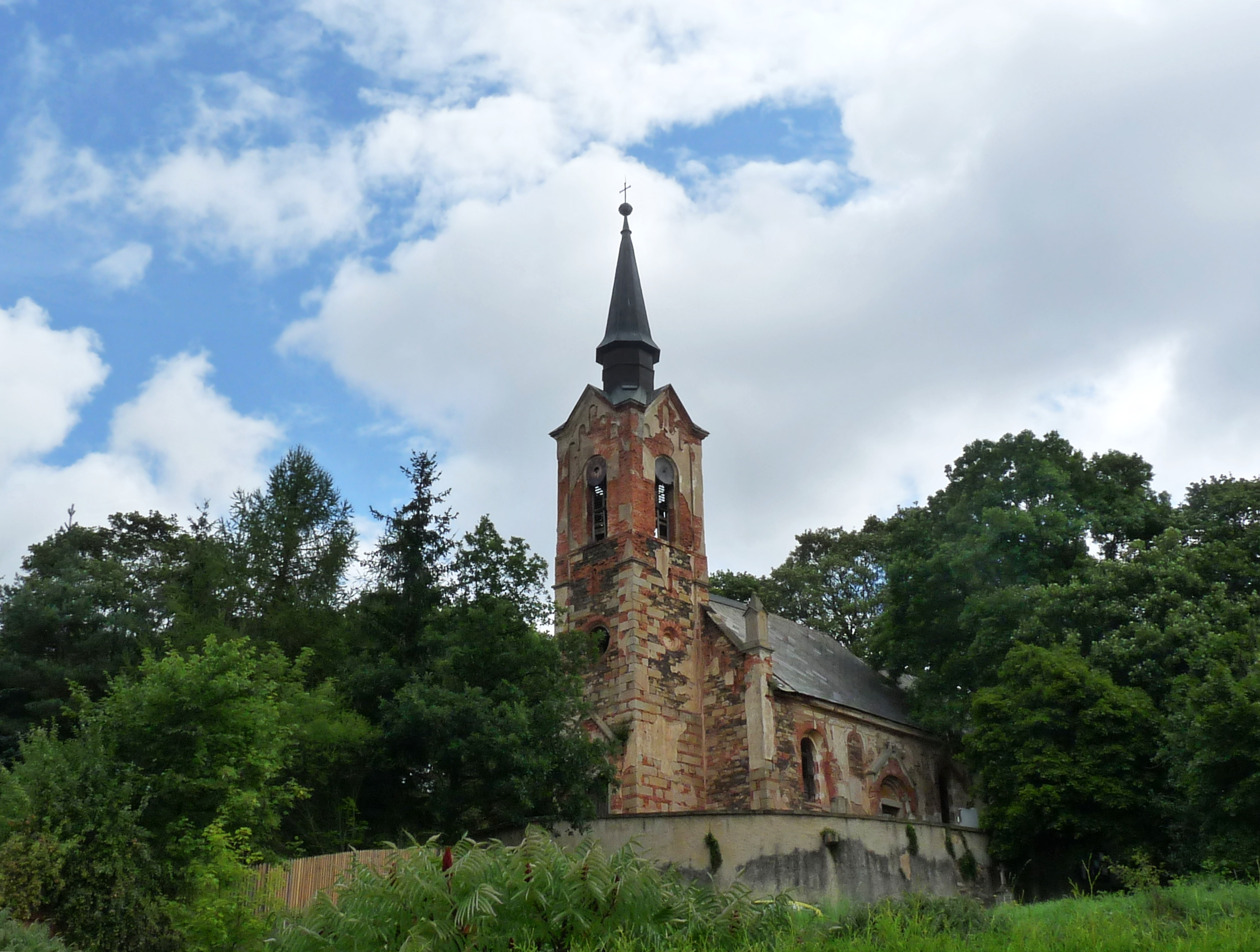 Kostel svatého Jiří, Luková (Manětín).